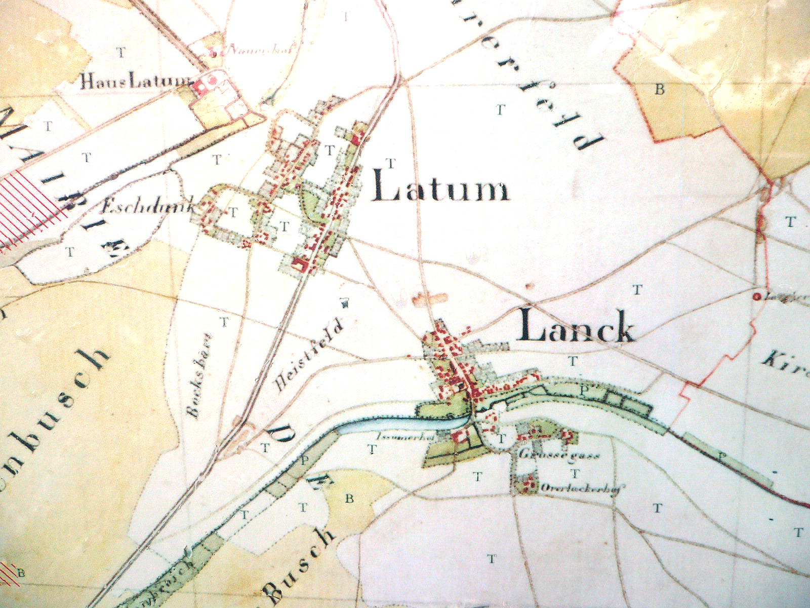 Kartenaufnahme der Rheinlande durch Tranchot und von Müffling 1803-1820 hier: Detail Lank-Latum